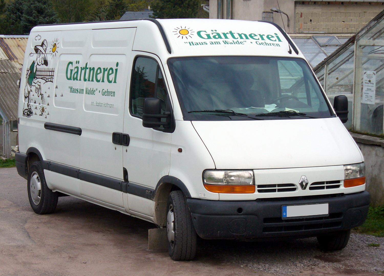 Renault Master II Phase I